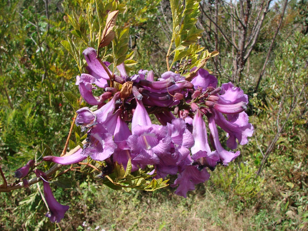 Jacaranda macrantha - BIGNONIACEAE - Chapada Imperial - Distrito Federal - Brasil.